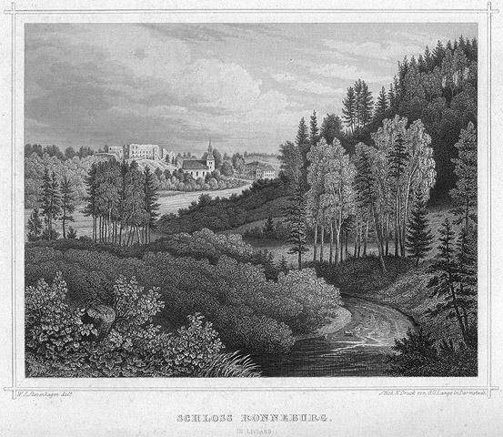 Vaade Raunale 1866 põhja poolt Rauna jõe orust.